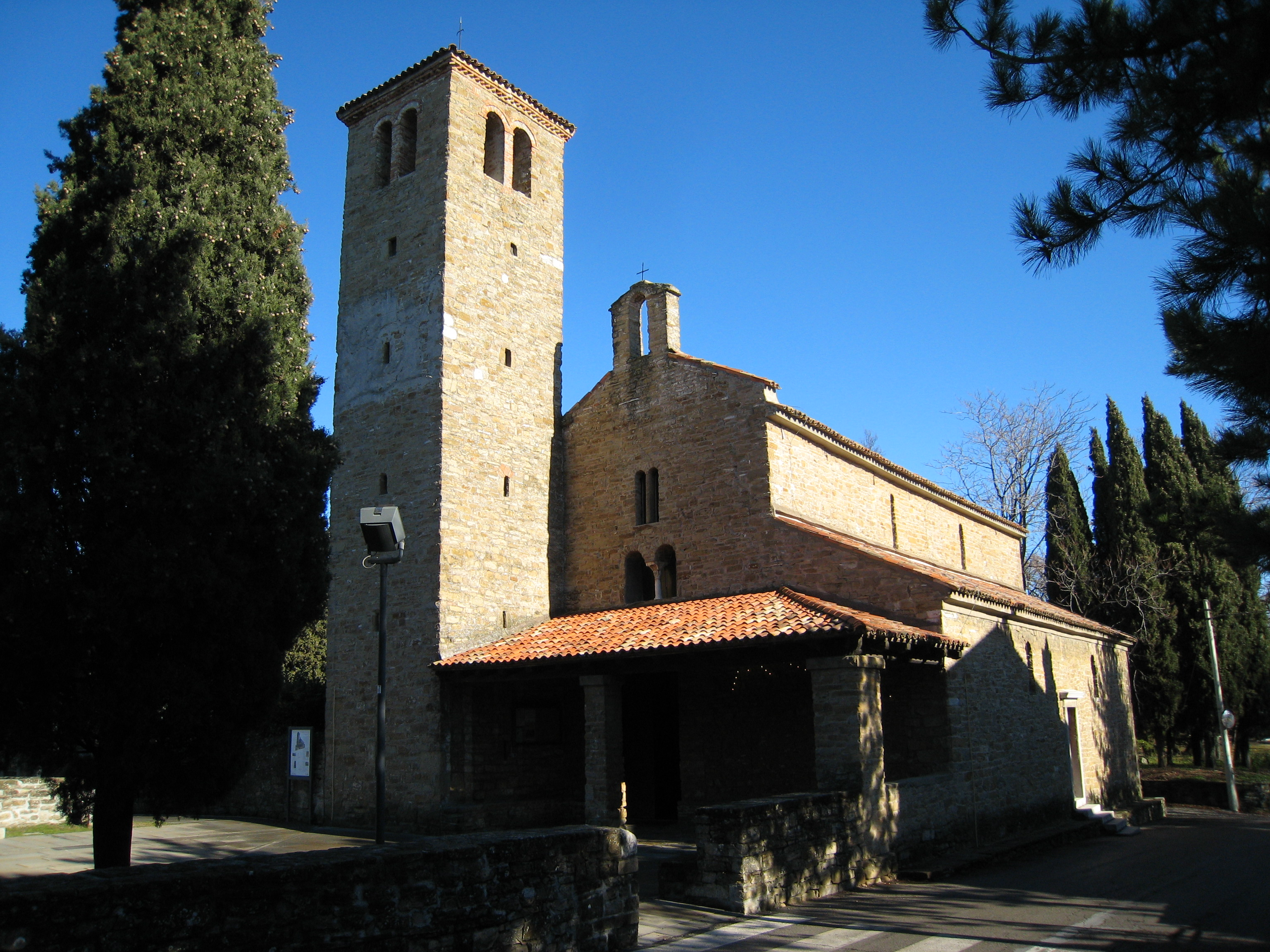 La chiesetta di Muggia vecchia (TS)